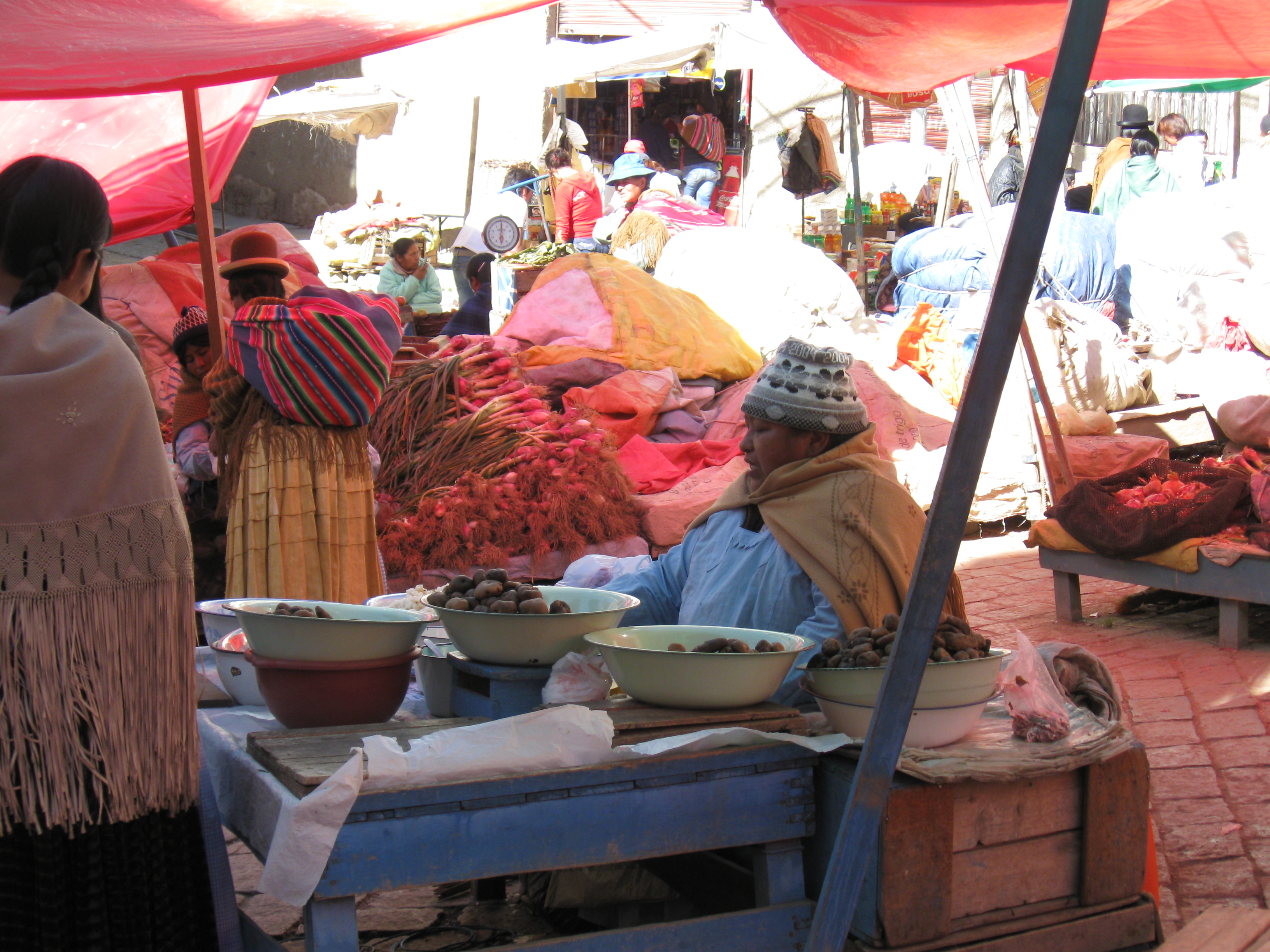 Eso mismo. Papa remojada, chuño remojado, tunta remojada, algo de ají molido y muchas otras cosas más. La temperatura, a pesar del sol, era muy baja (descripción del autor).